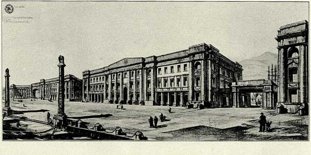 Palazzata